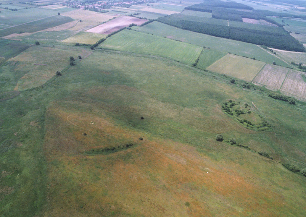 Zalaszegvár, Hungary, aerialphotography